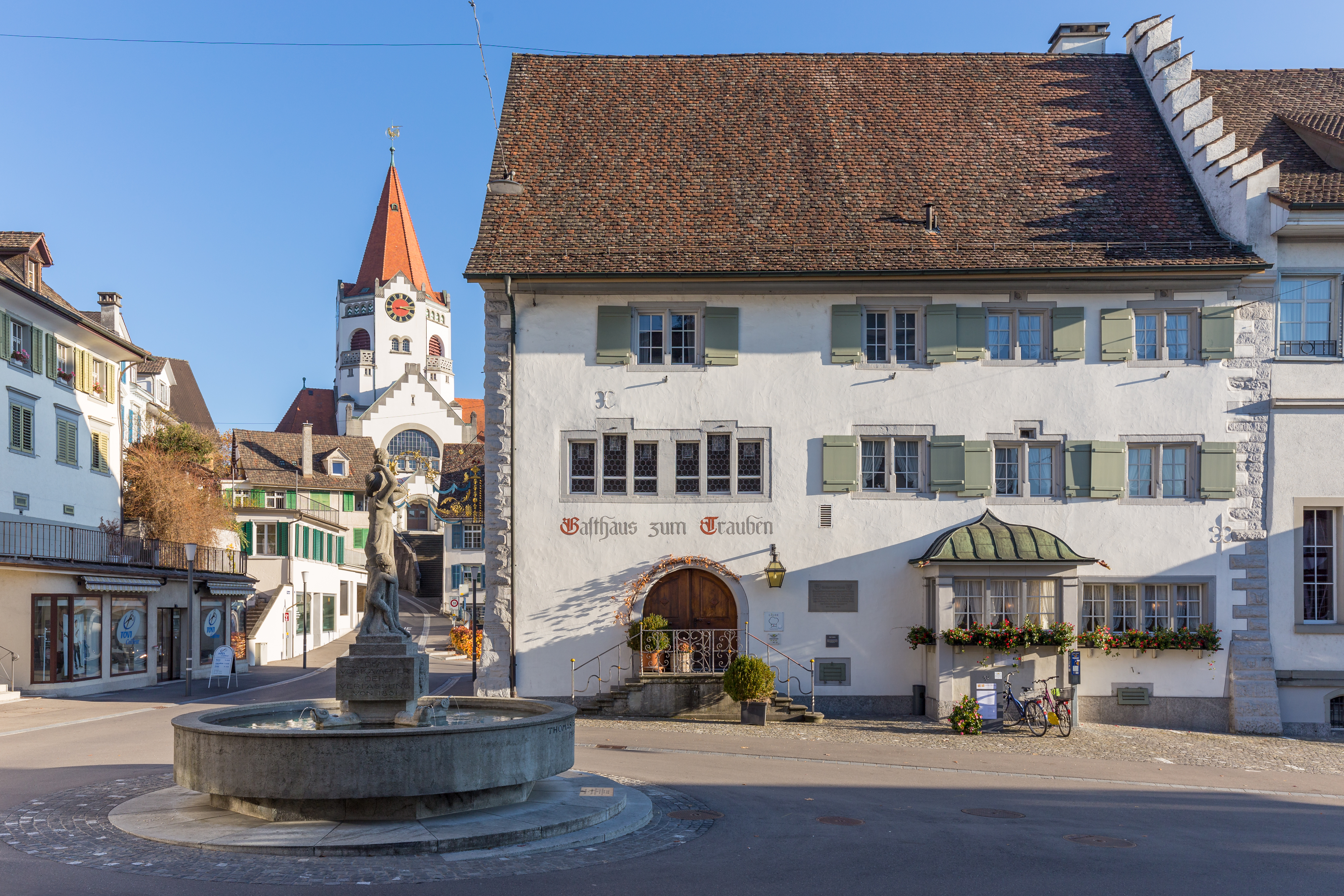 Reformed Church and "Gasthaus zum Trauben"